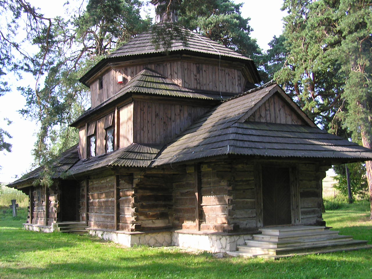 autor: Yarek shalom 10:52, 2 February 2007 (UTC)yarek shalom